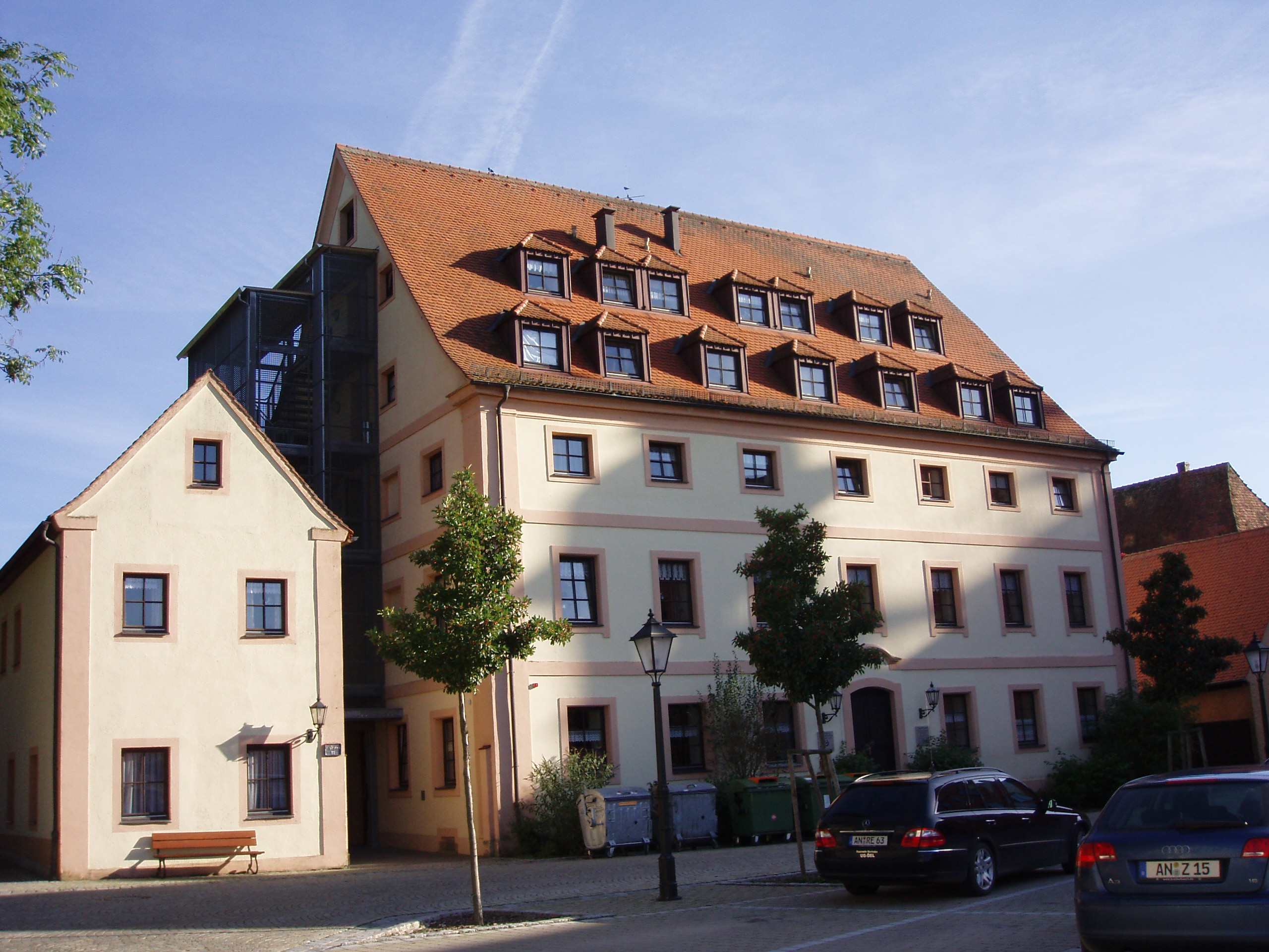 Gabrielihaus Herrieden, Vogteiplatz 11